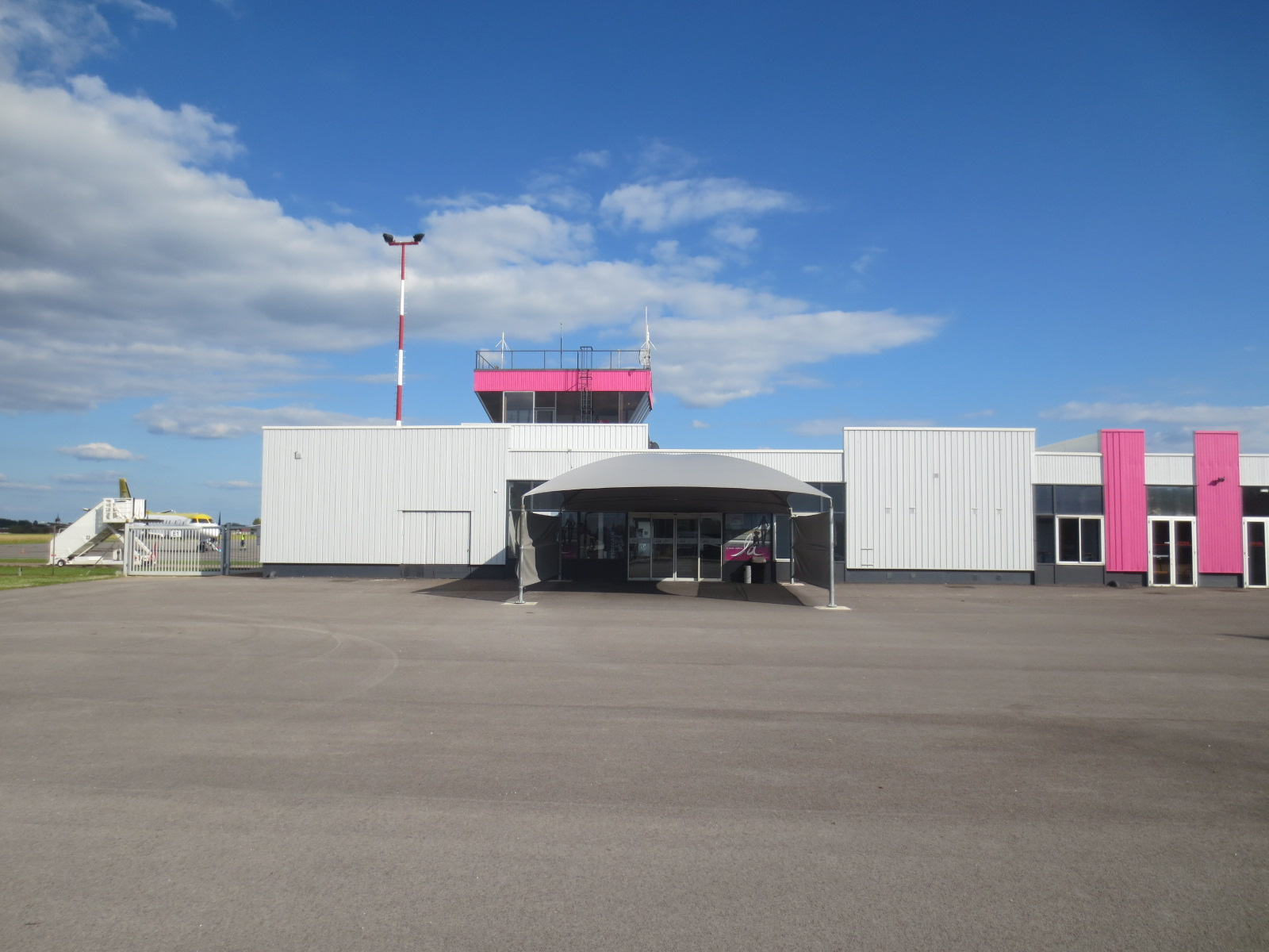 Aéroport de Dole-Jura